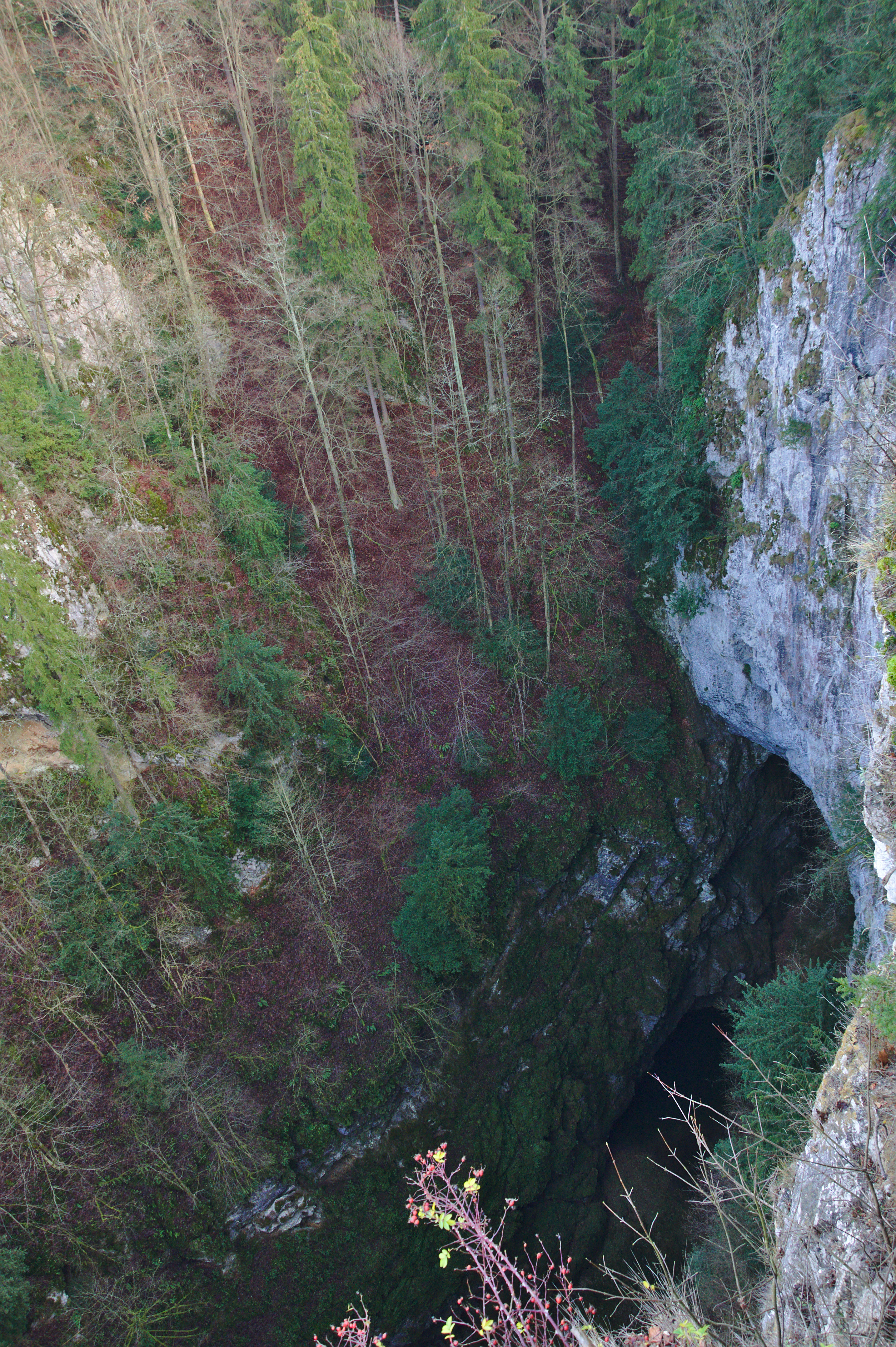 Pohled na dno propasti z Horního můstku, Macocha, Ostrov u Macochy, okres Blansko